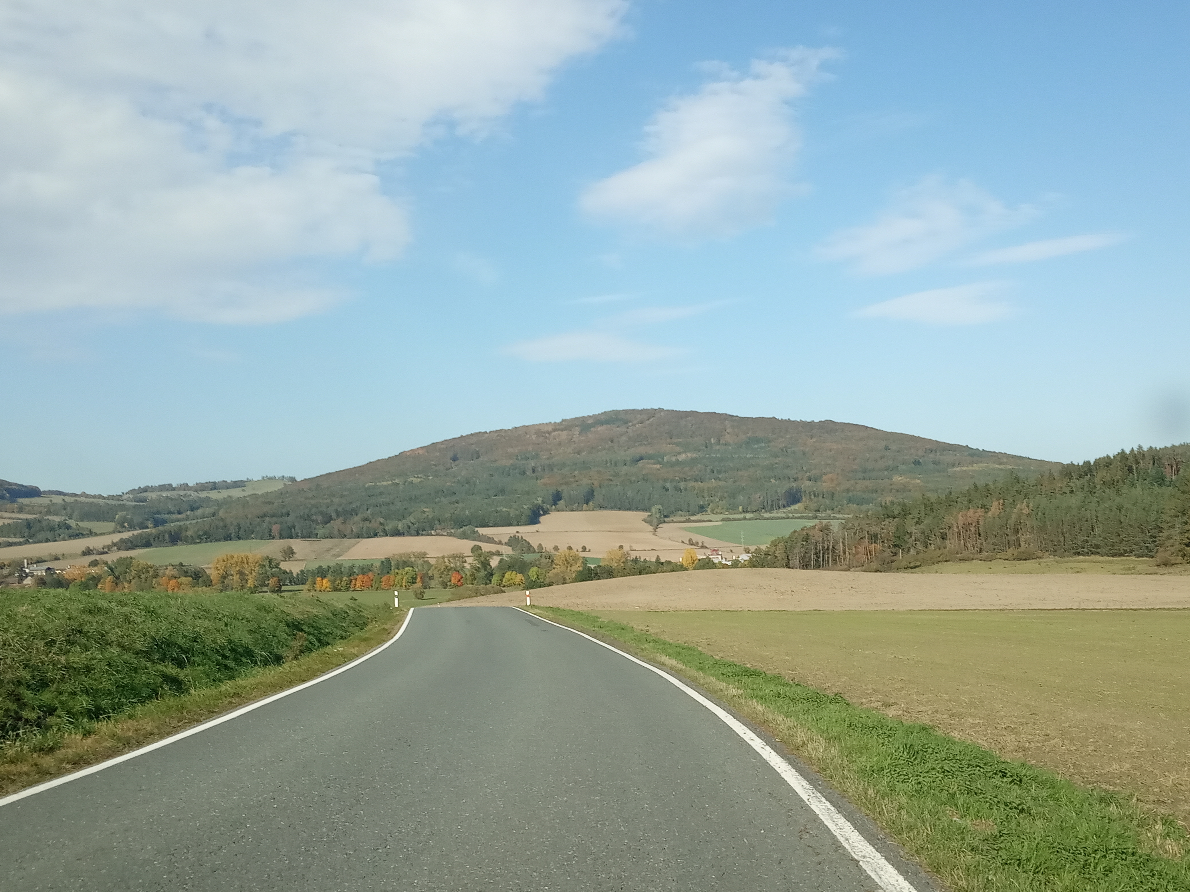 Běleč od Dehtína směr na Výrov